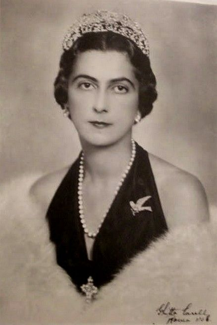 Princesa Iolanda Margatita di Savoia, filha do rei Victor Emanuel III da Itália e da rainha Elena de Montenegro